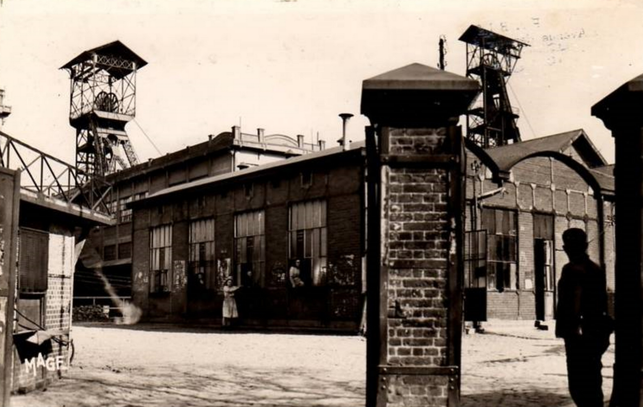 La Fosse n° 3 - 3 bis - 3 ter de la Compagnie des mines de Marles était un charbonnage constitué de trois puits situé à Auchel, Pas-de-Calais, Nord-Pas-de-Calais, France.